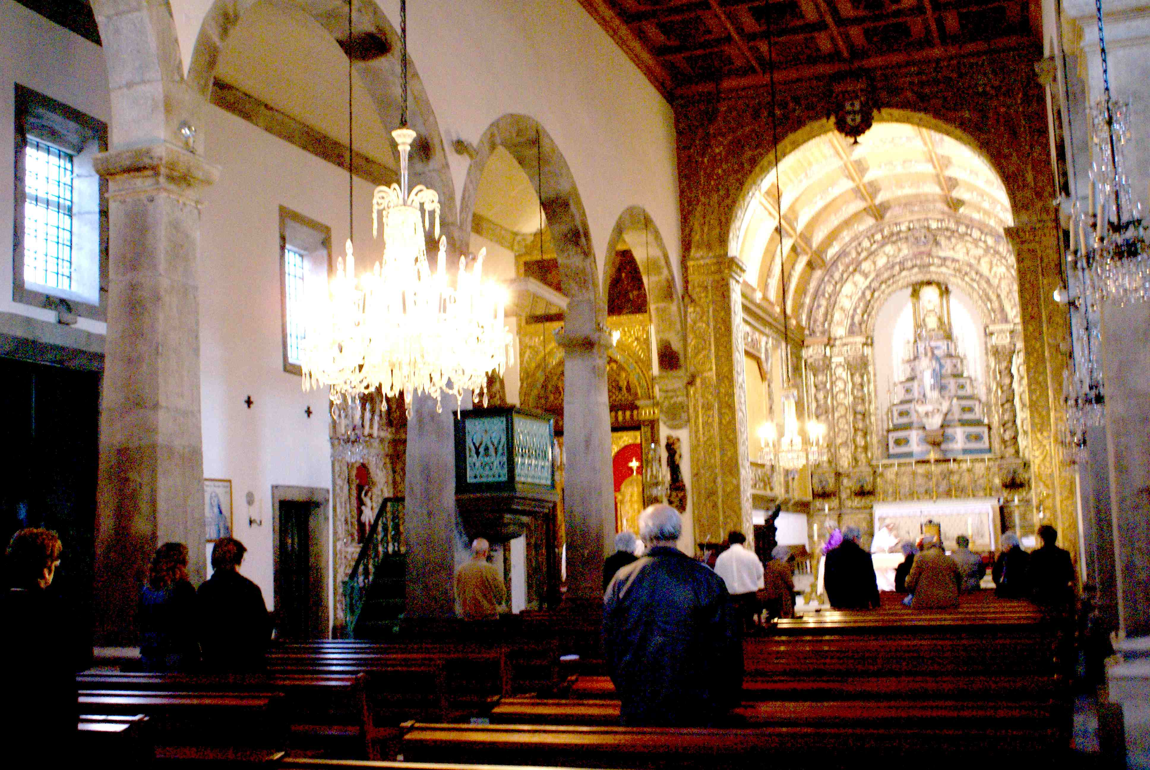 Igreja de Nossa Senhora da Conceição, interior, Angra do Heroismo, ilha Terceira, Açores, Portugal.